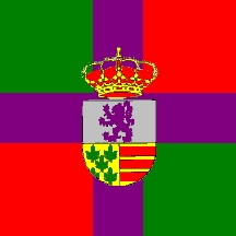 Bandera Salvaleón